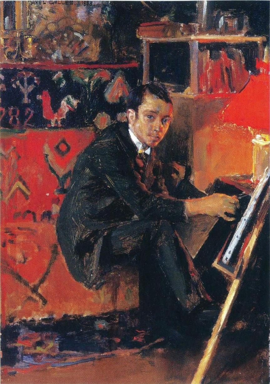 Axel Gallénin maalaus Eero Järnefeltistä työnsä parissa.